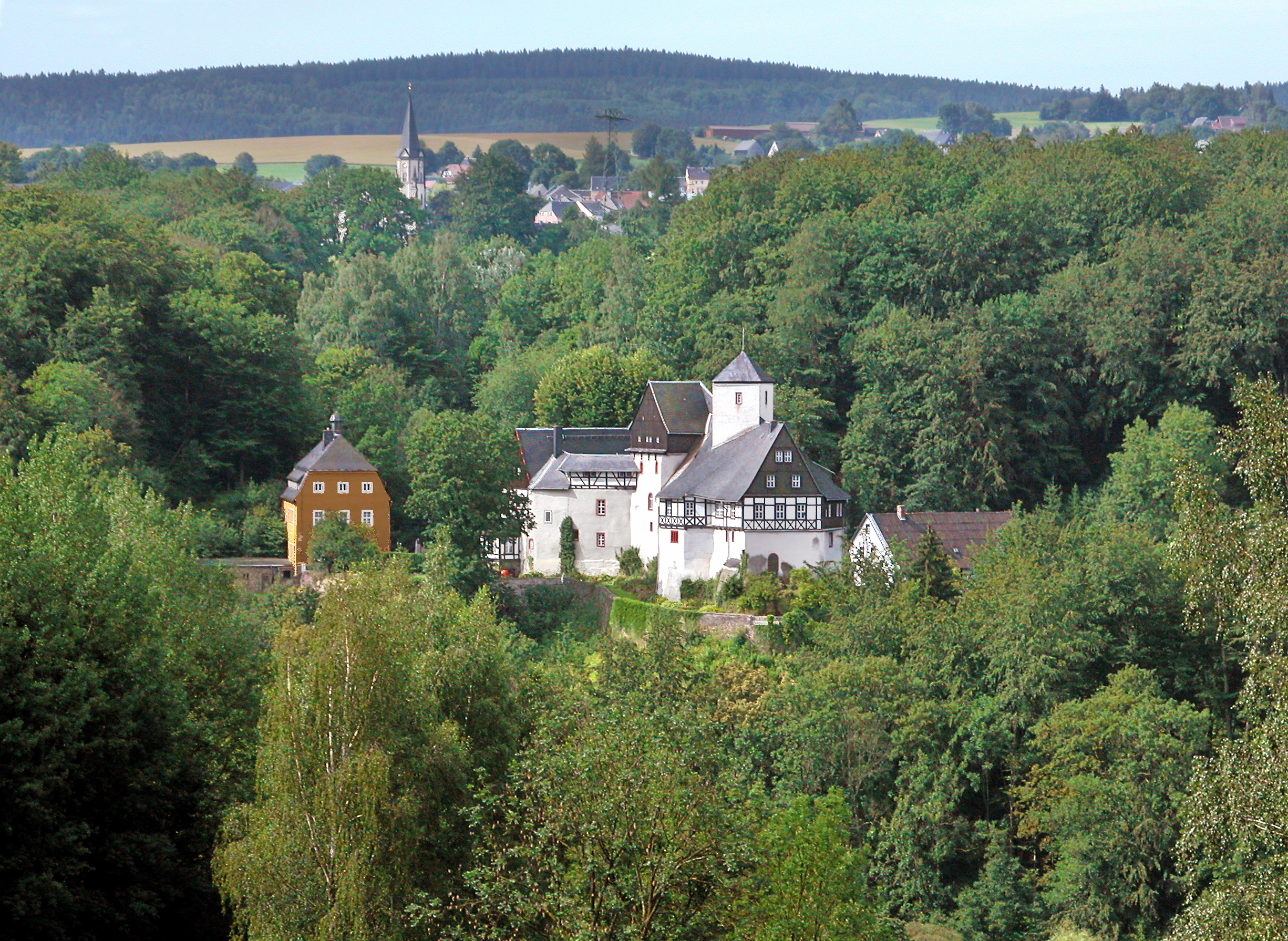 22.07.2009 09514 Rauenstein (Pockau-Lengefeld), Rauenstein 4 (GMP: 50.728442,13.201055): Schloß Rauenstein. Mittelalterliche Burg (13./14. Jh.), um 1630 Umbauten und Erweiterungen. In der DDR Kindererholungsheim. 1999 von Carl-Wilhelm von Herder reprivatisiert. Sicht von Norden. Nicht öffentlich zugänglich. Im Hintergrund der Ort Lengefeld. [DSCN38271.TIF]20090722310DR.JPG(c)Blobelt